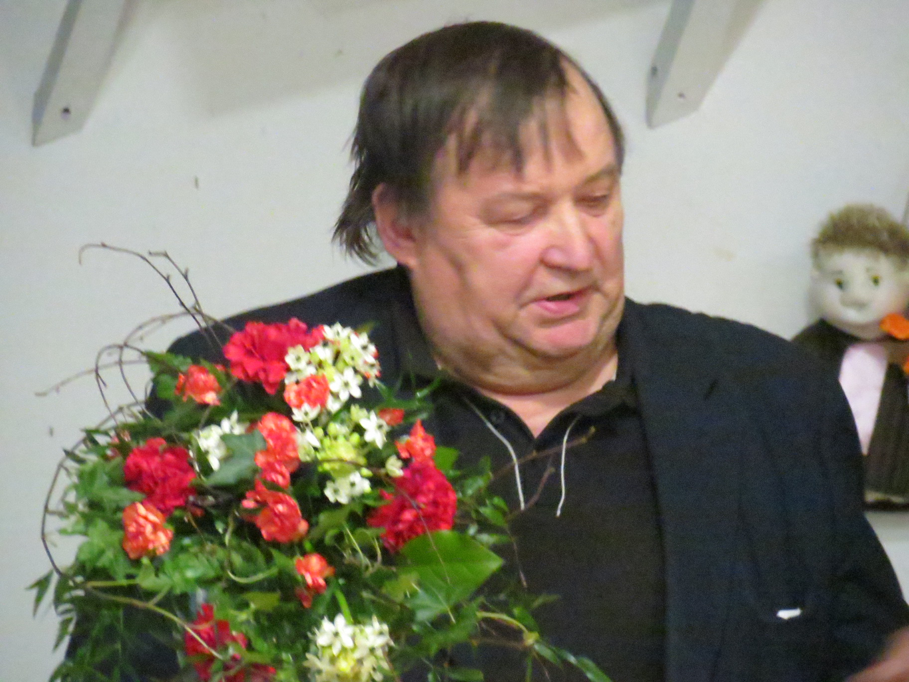 Suomalainen poliitikko Osmo Polvinen puhuu Sotkamon työväentalolla 19.11.2015